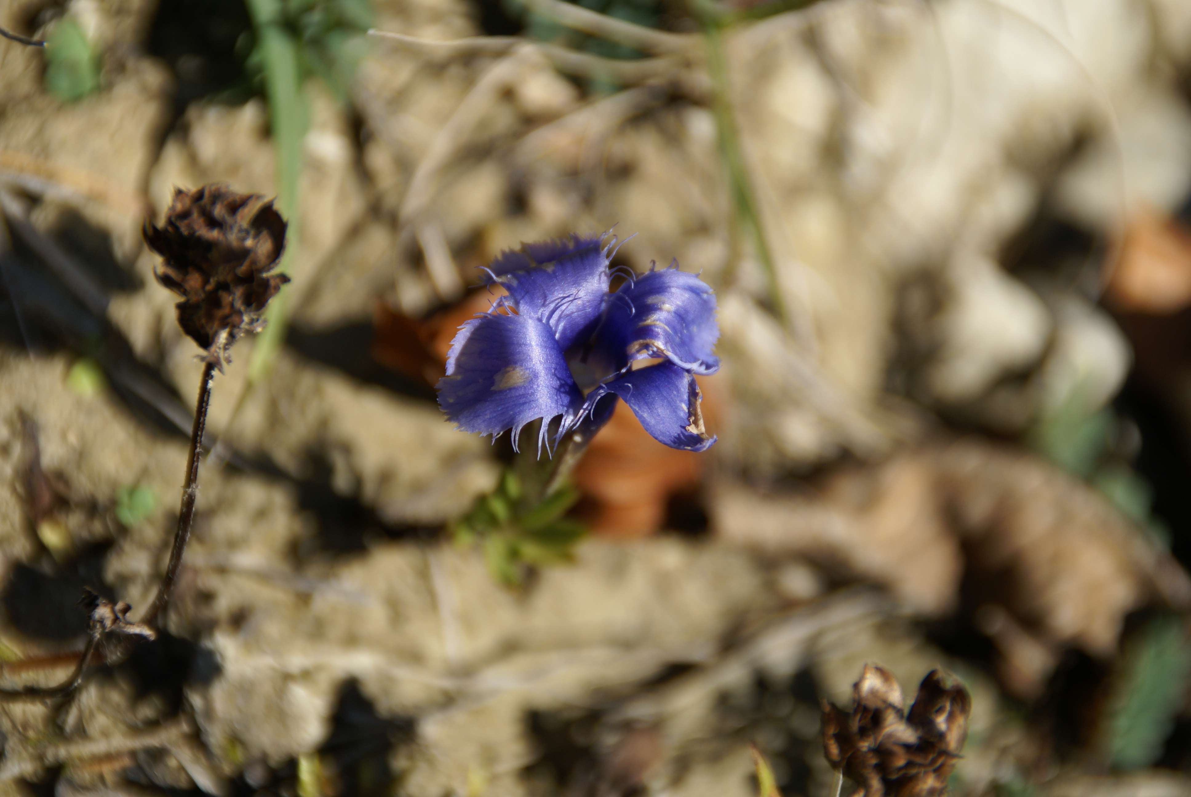 Gewöhnlicher Fransenenzian, Fundort: Wacholderheide bei Heubach (Ostalb)